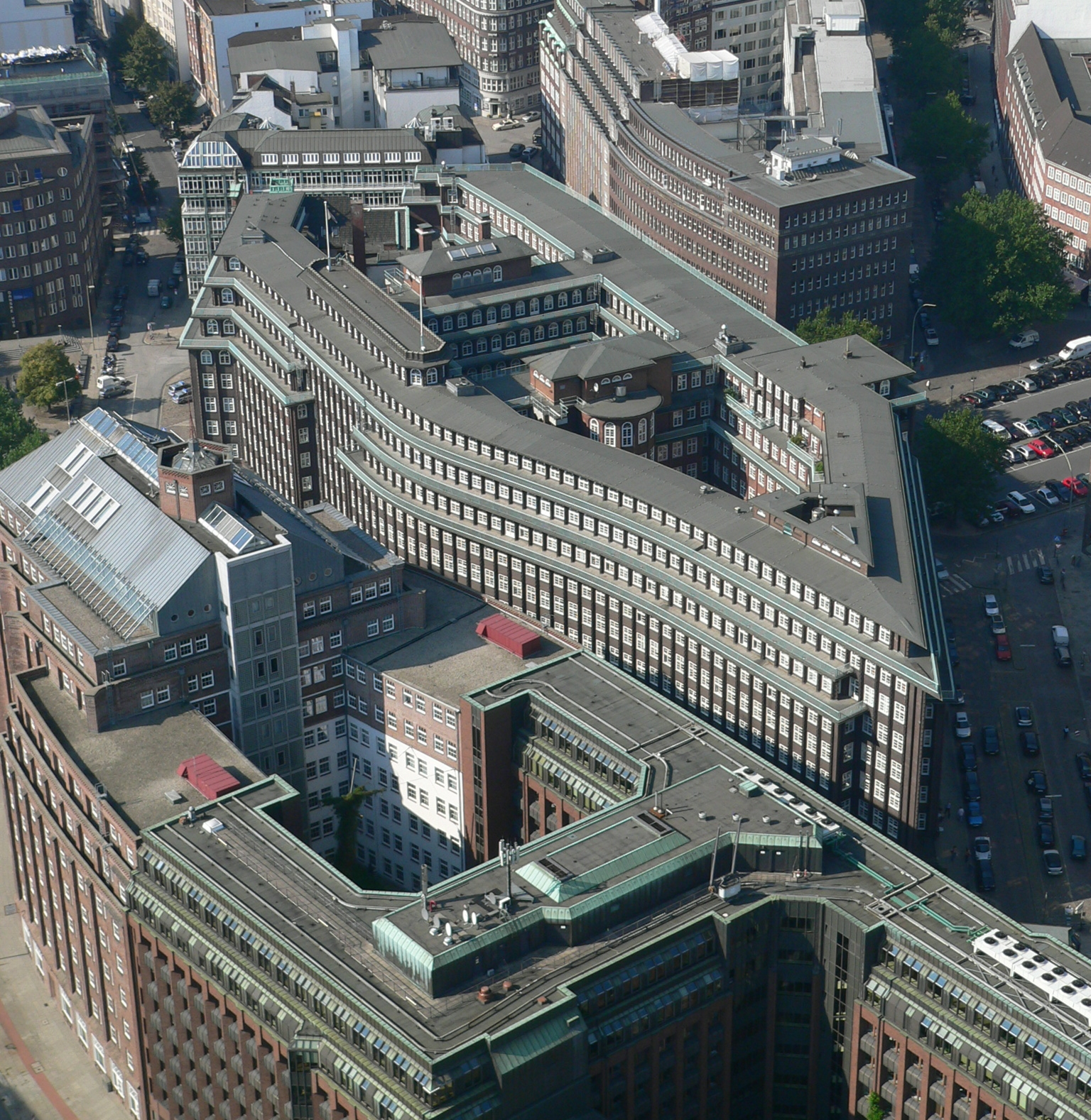 Chilehaus - Luftansicht mit den Staffelgeschossen.This is a photograph of an architectural monument.